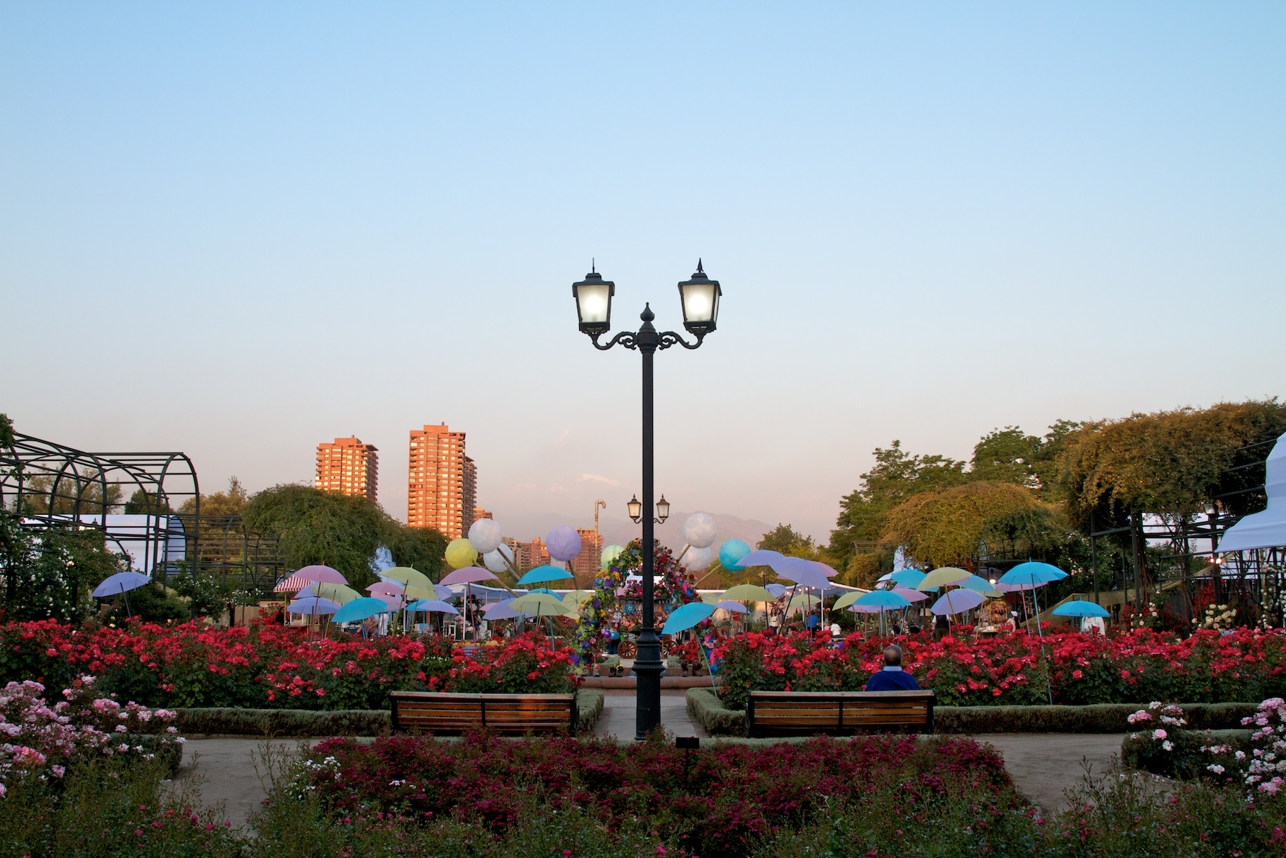 Parque Araucano 44